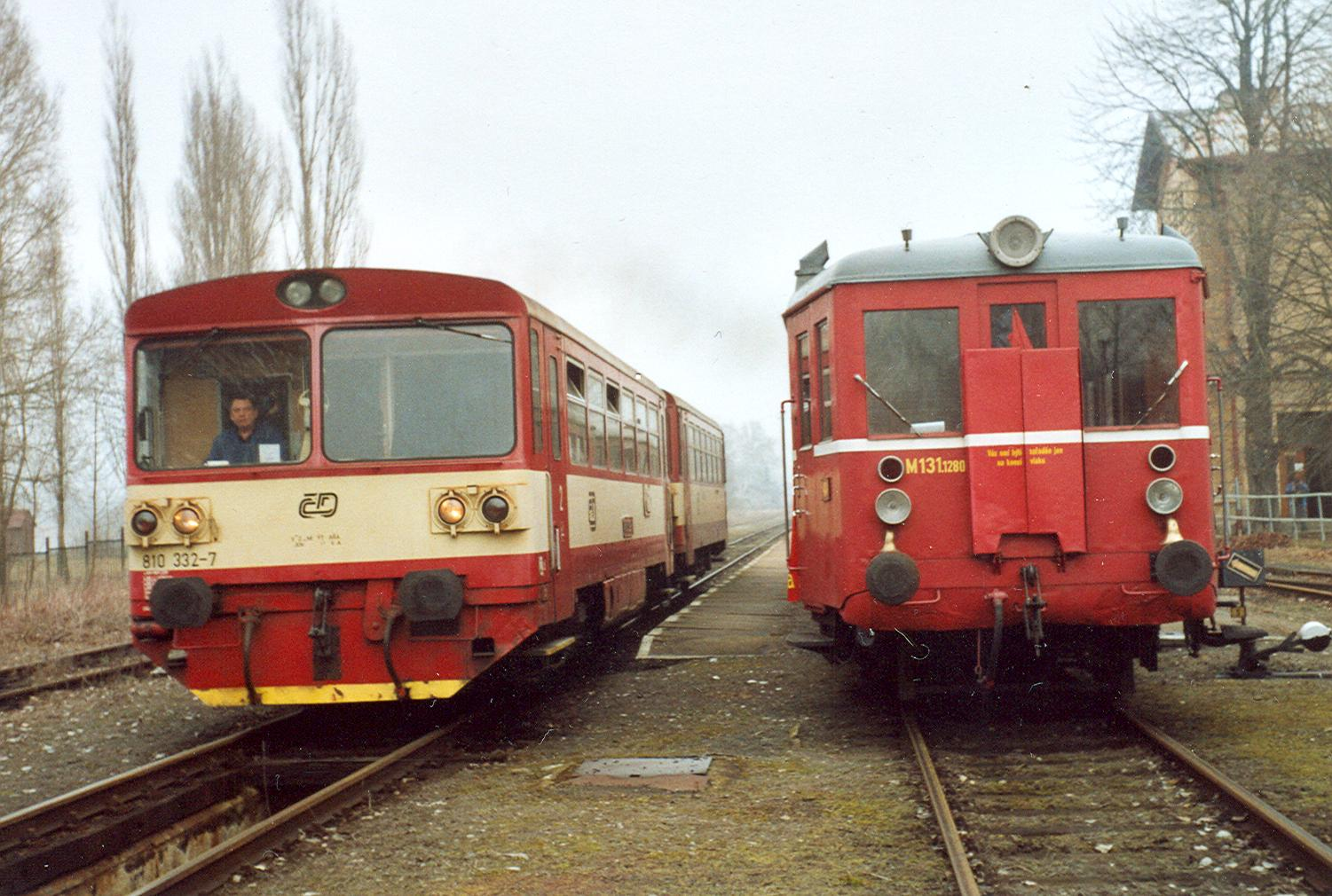 Sonderfahrt der Eisenbahnfreunde Saubernitz anläßlich des Jahrmarktes in Úštěk.